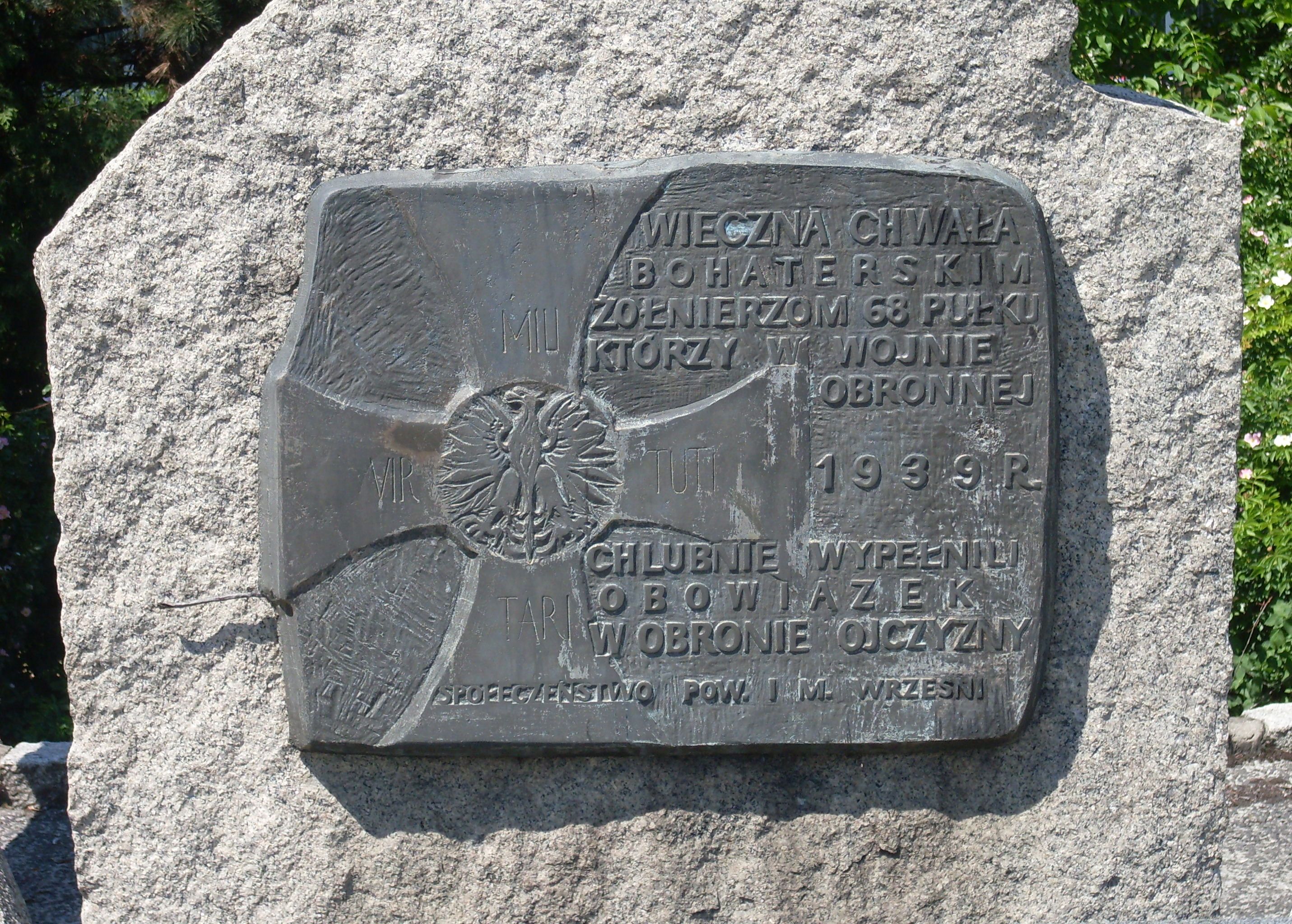 Tablica na pomniku 68 Pułku Piechoty we Wrześni 2